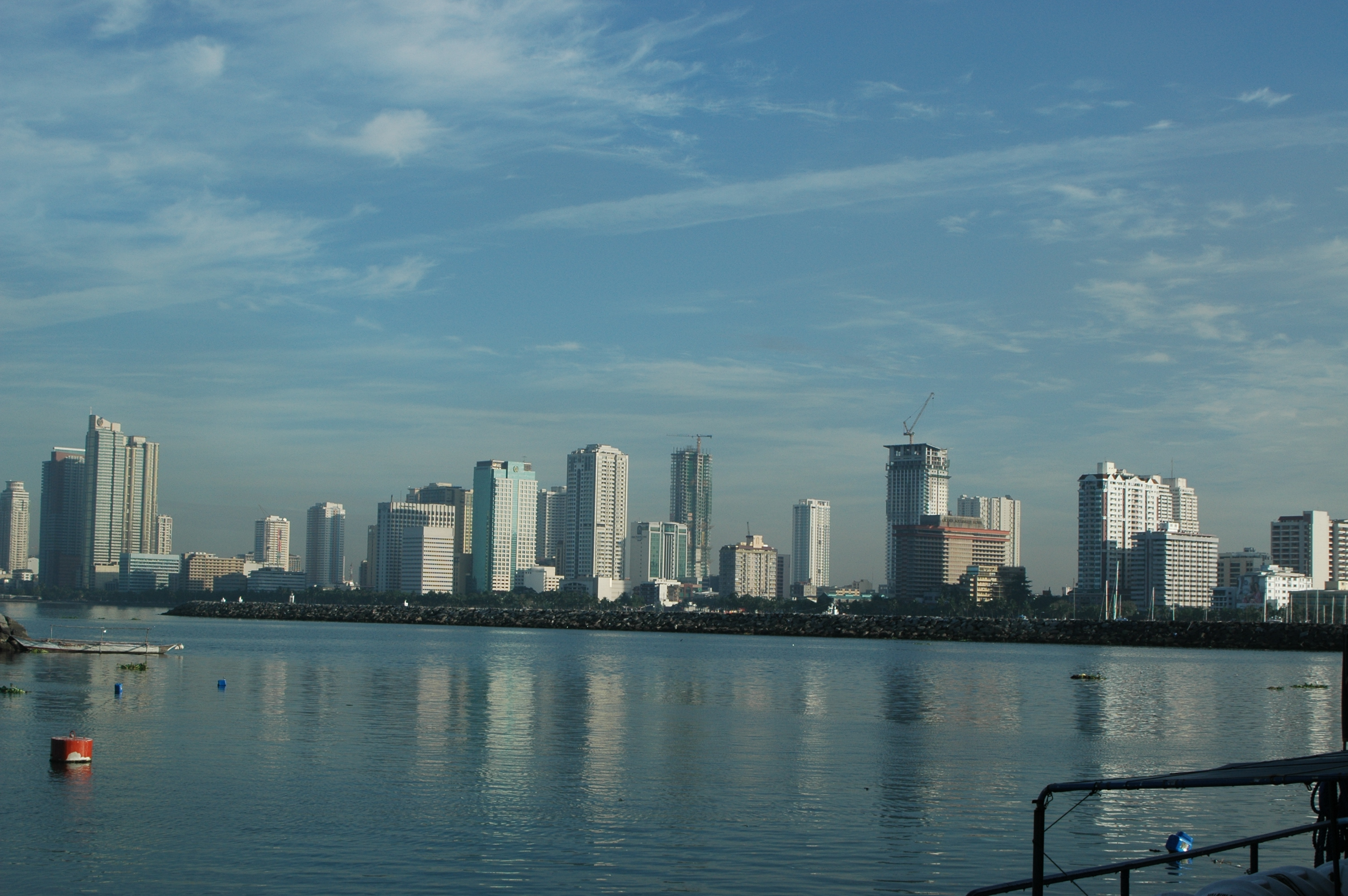 Manila 27 Nov 11